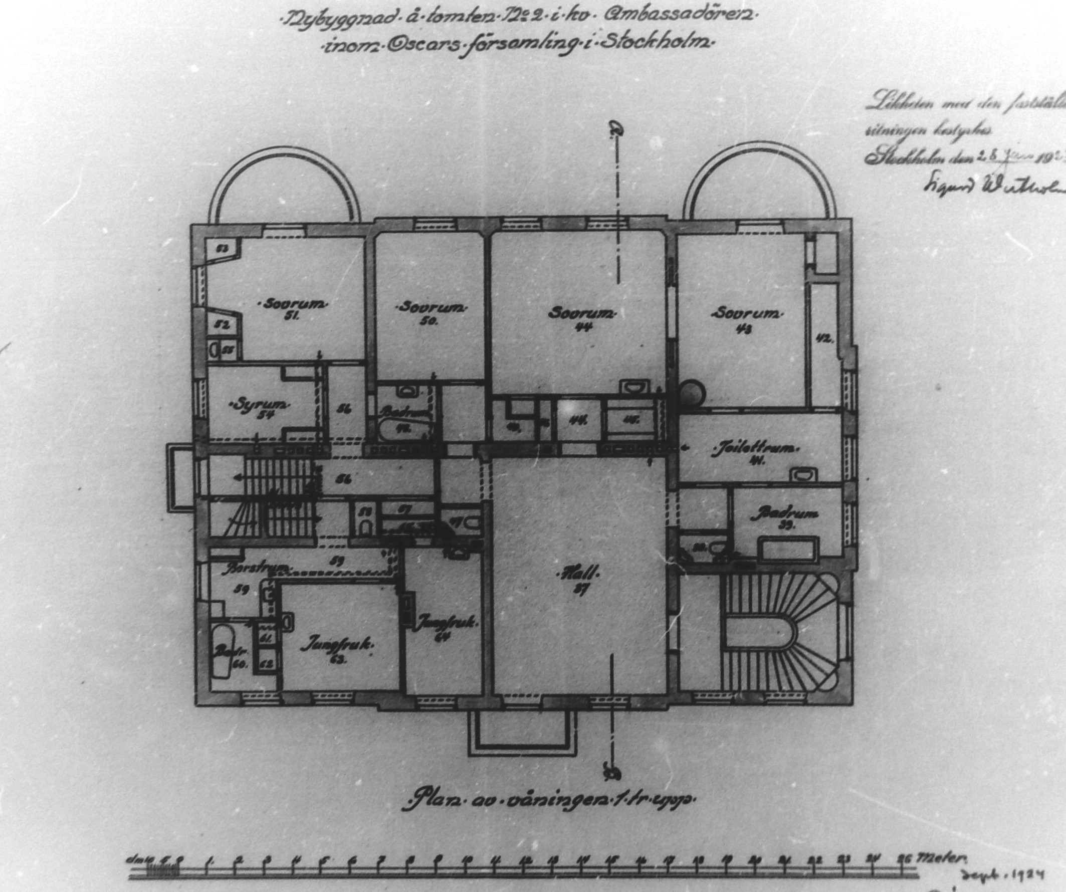 Villa Josephson i Diplomatstaden, plan 1 trappa